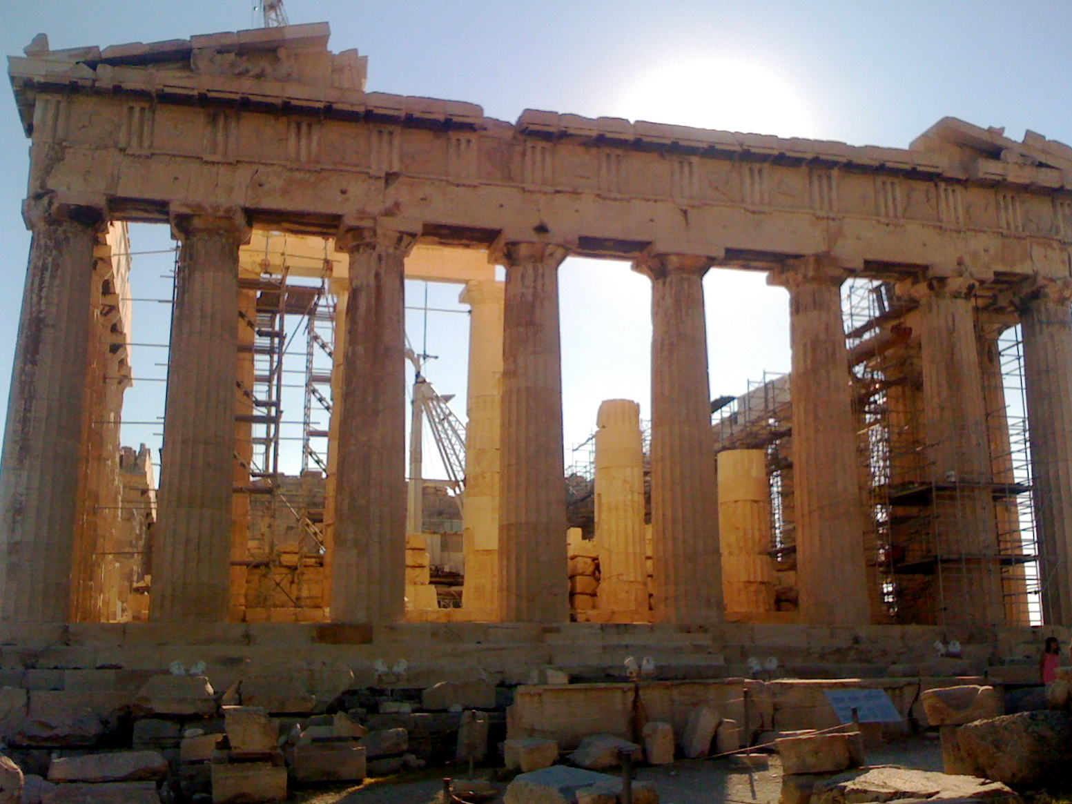 Partenonas